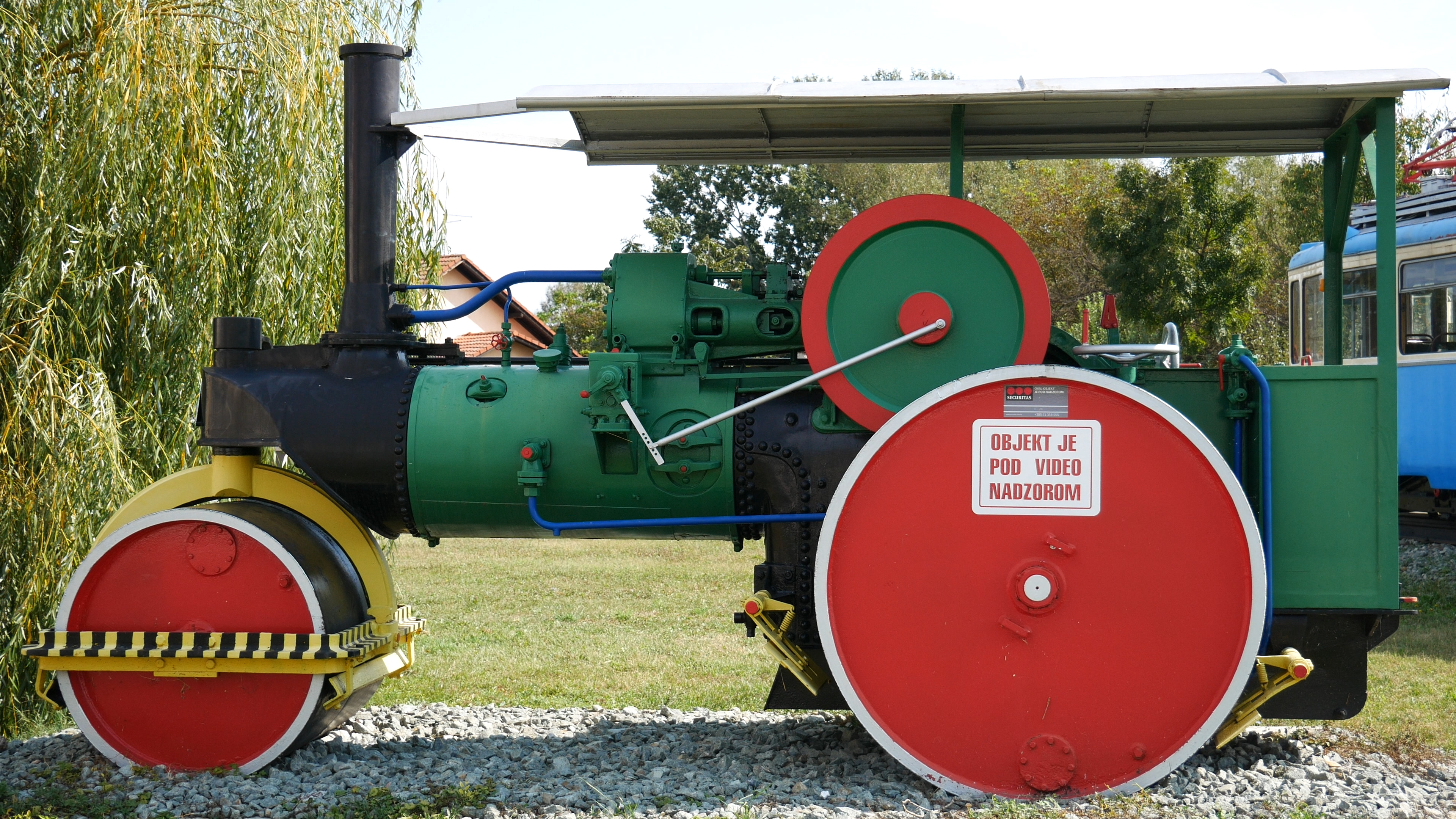 Industrijski park u SLavonskom Brodu